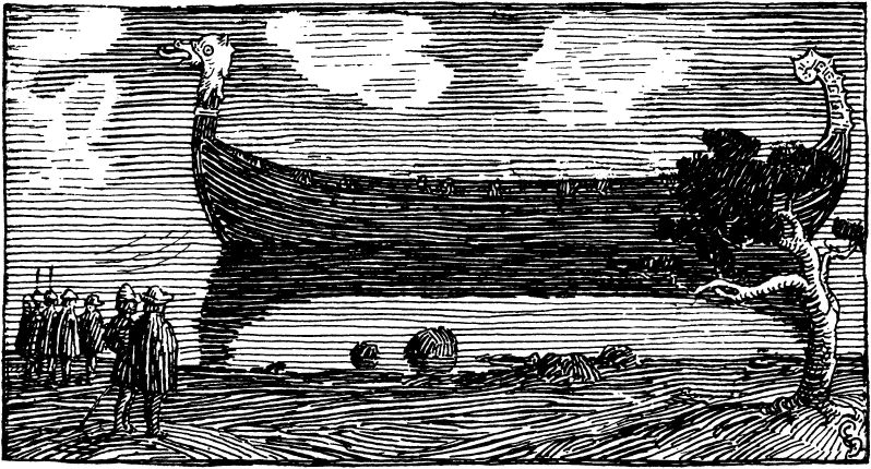 Halfdan Egedius: Illustration for Olav Trygvasons saga. Snorre 1899-edition. «Ormen lange» nb: «Ormen lange» nn: «Ormen lange»